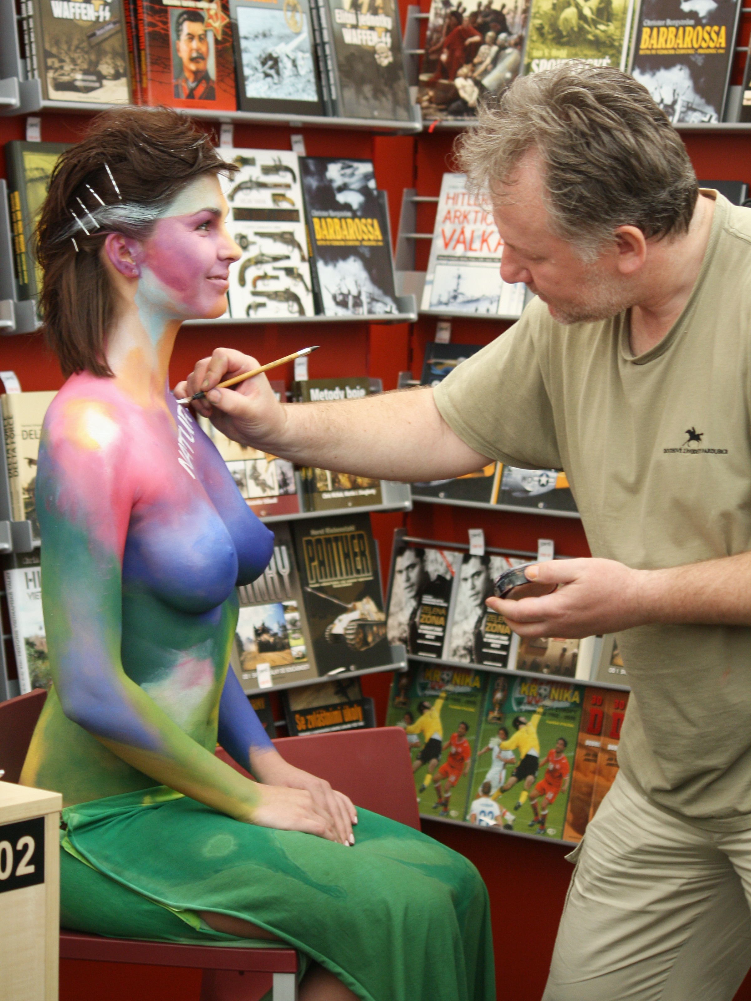 Bodypainting na 17. mezinárodním knižním veletrhu Svět knihy v Praze Personality rights warning Although this work is freely licensed or in the public domain, the person(s) shown may have rights that legally restrict certain re-uses unless those depicted consent to such uses. In these cases, a model release or other evidence of consent could protect you from infringement claims.